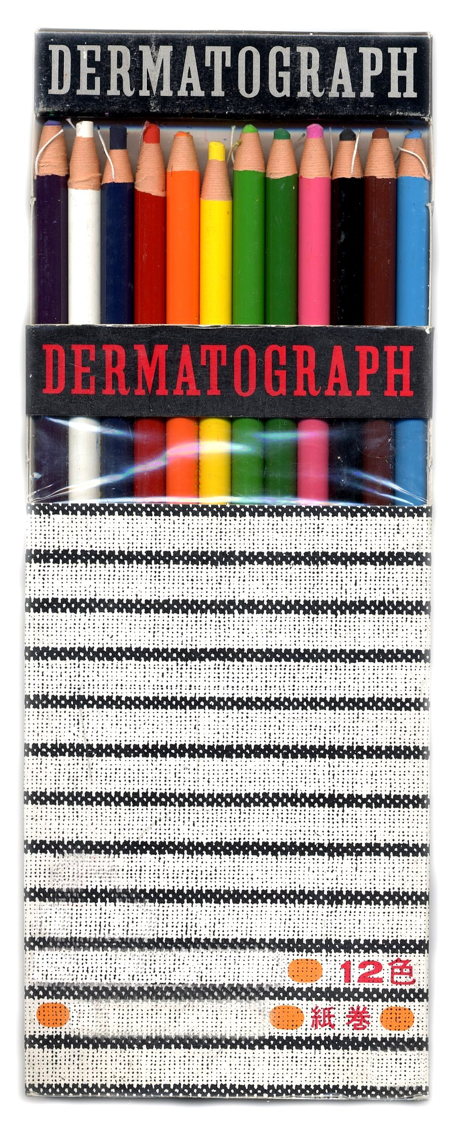 Dermatograph